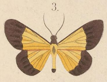 Craspedosis melanura (Kirsch, 1877) (Eusemia)